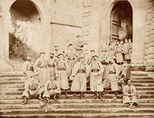 Zuavi pontifici ritratti sulla scalinata del castello di Mentana dopo la vittoria riportata contro le truppe garibaldine nel novembre del 1867